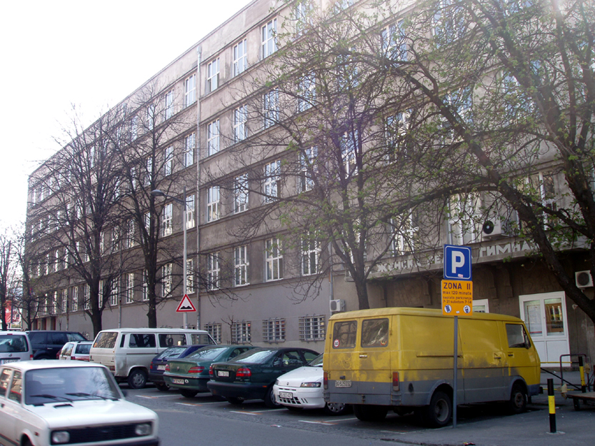 V beogradska gimnazija